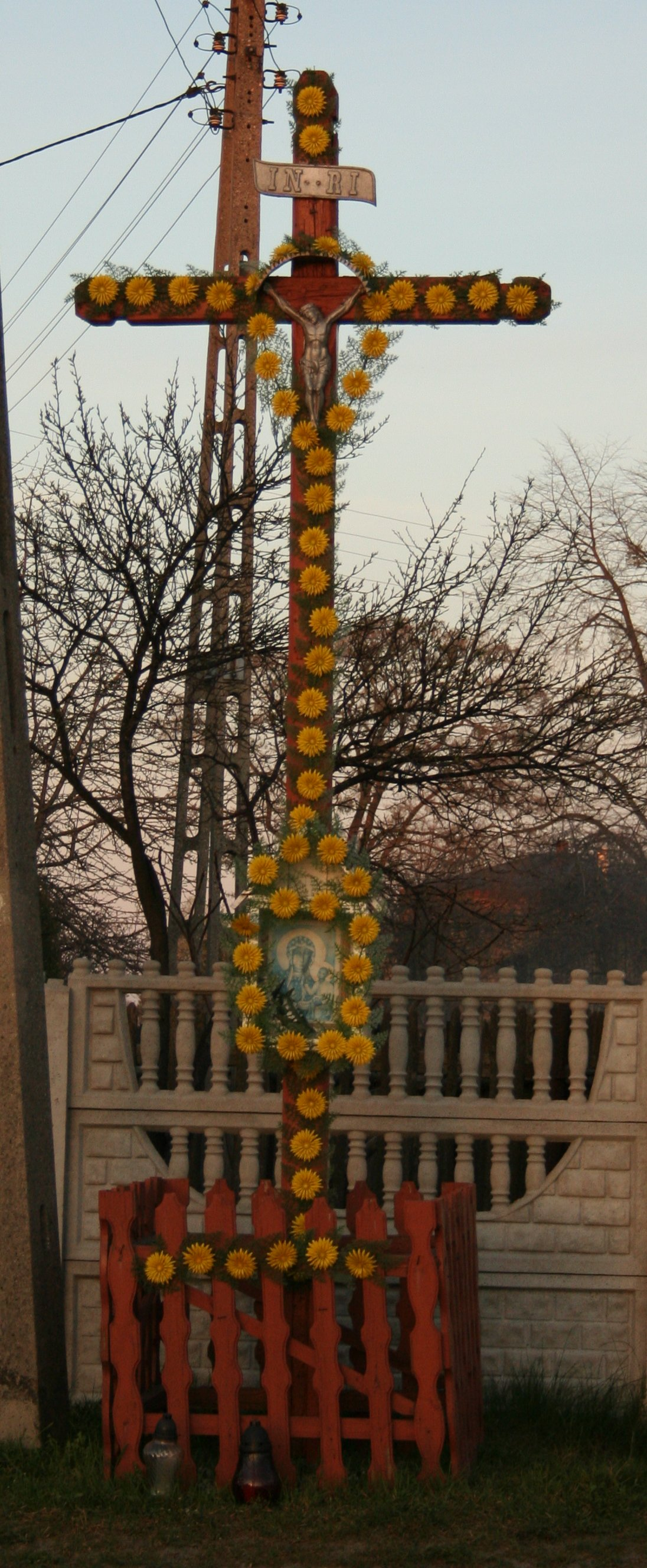 Krzyż przydrożny w miejscowości Leśniaki, gmina Konopiska, powiat częstochowski, województwo śląskie.